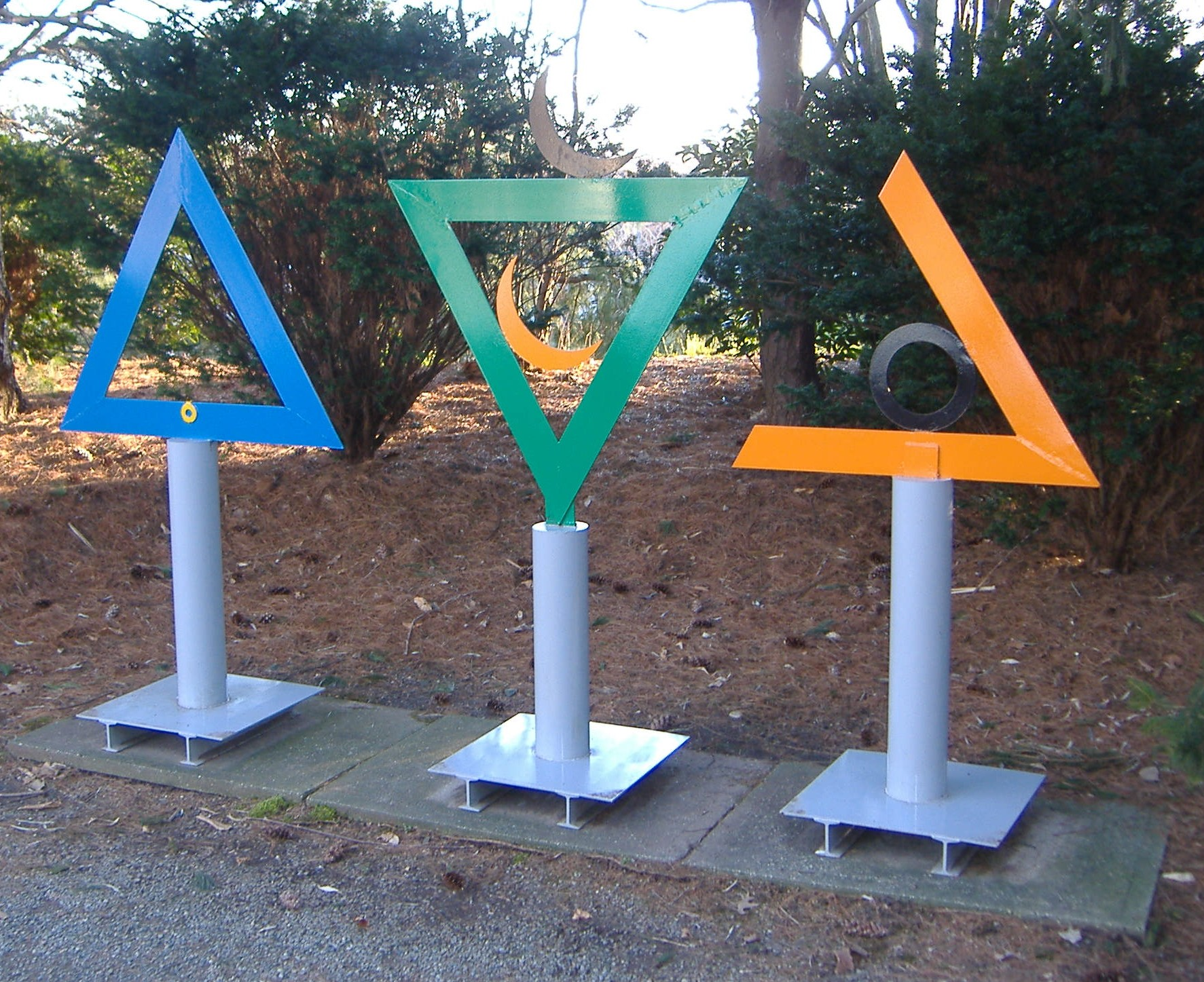 Benbow Bullock, Pillars of Hercules, 1995, painted steel. Situated in "Grounds for Sculpture", Hamilton New-Jersey.